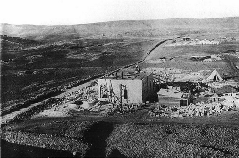 בניית בית אליעזר ותלמה ילין ברחוב רמב"ן בשכונת רחביה, 1924